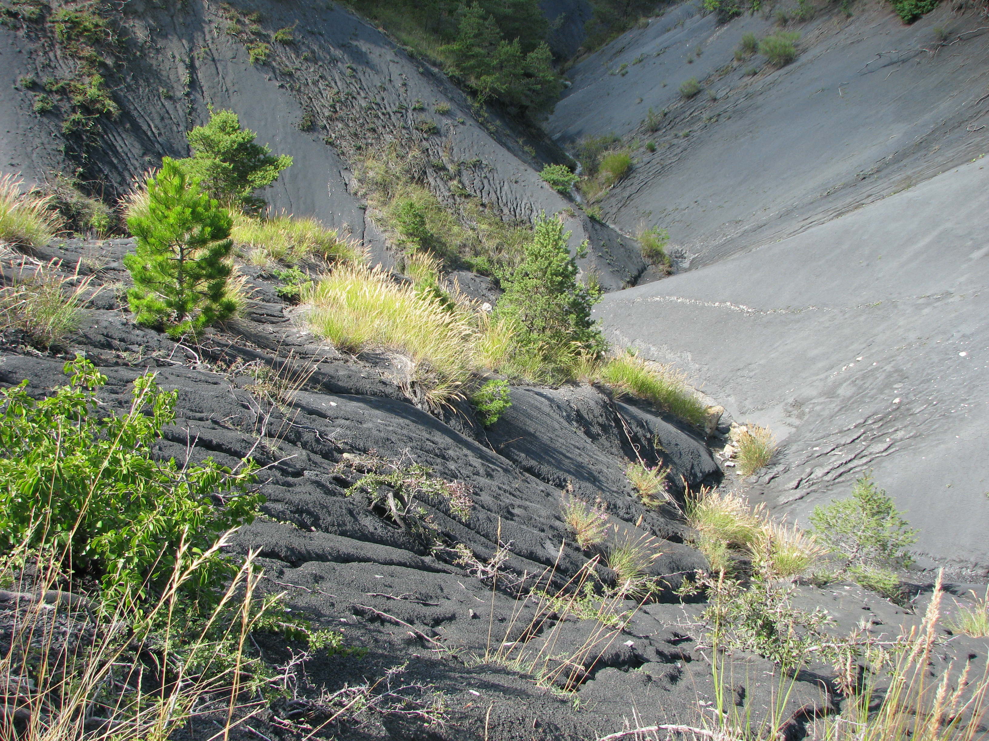 Parc naturel régional des Baronnies provençales